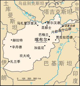 阿富汗地图。